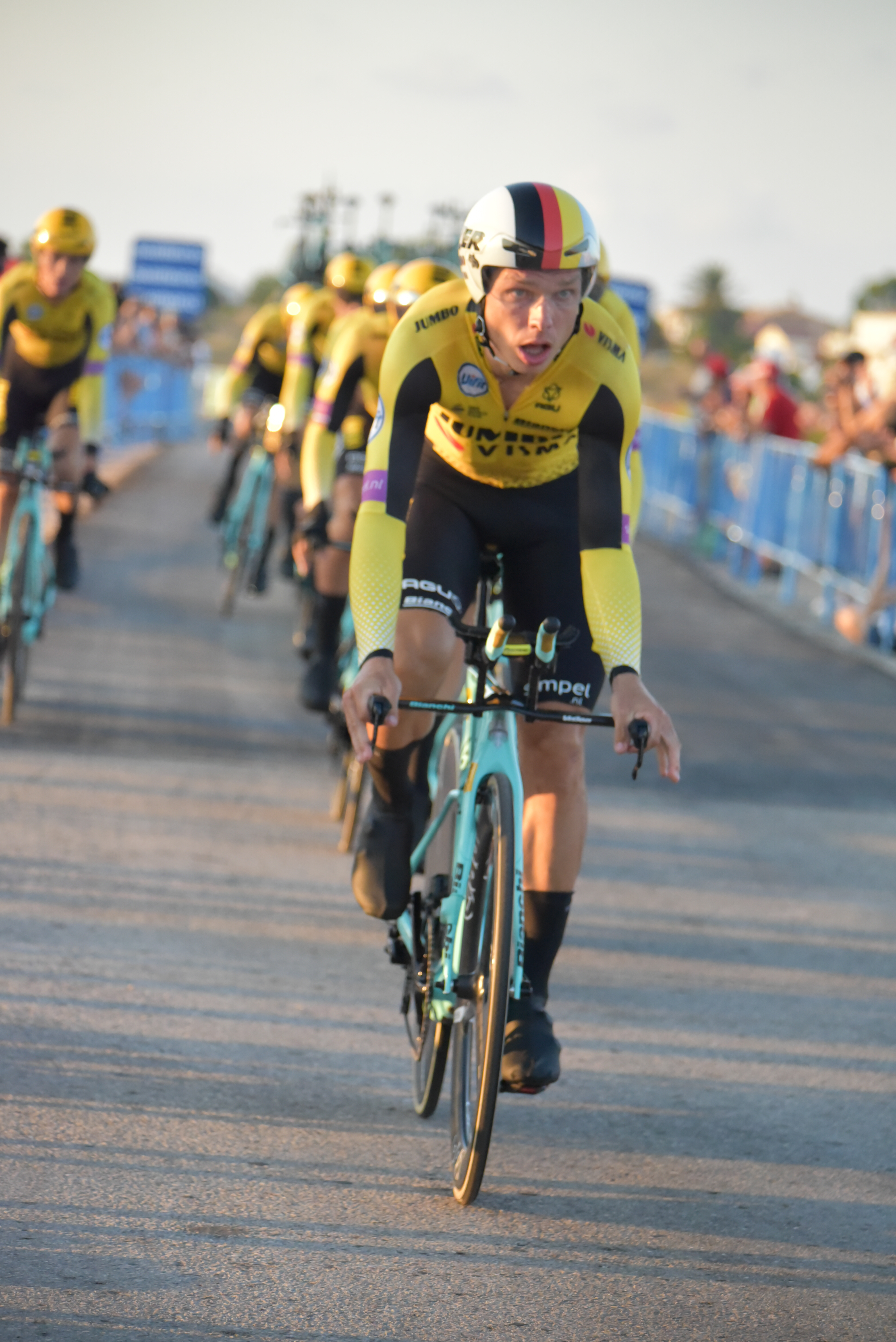 PRE_8967